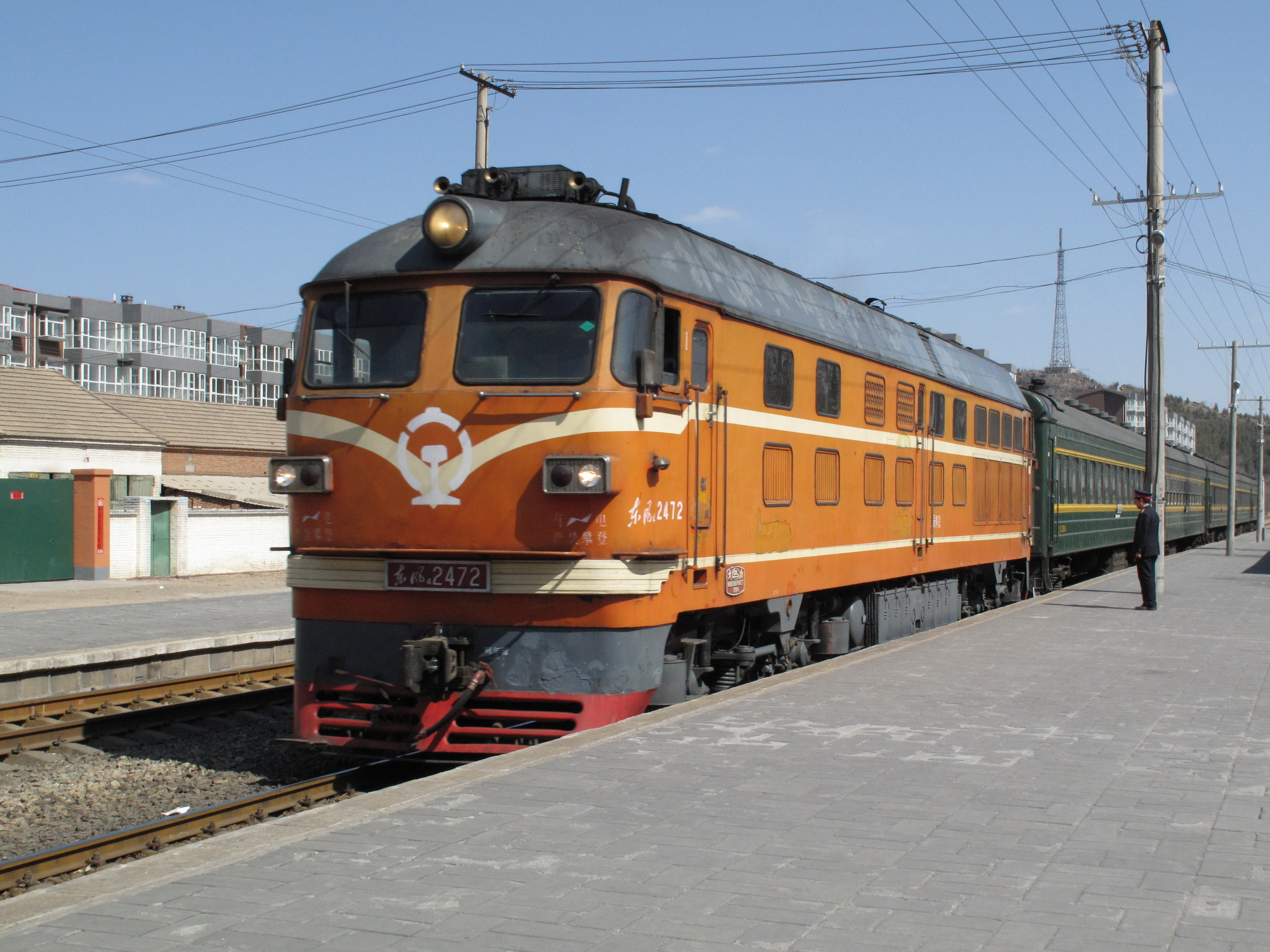 东风4B型2472号机车担当牵引4450次列车的任务于昌平北站